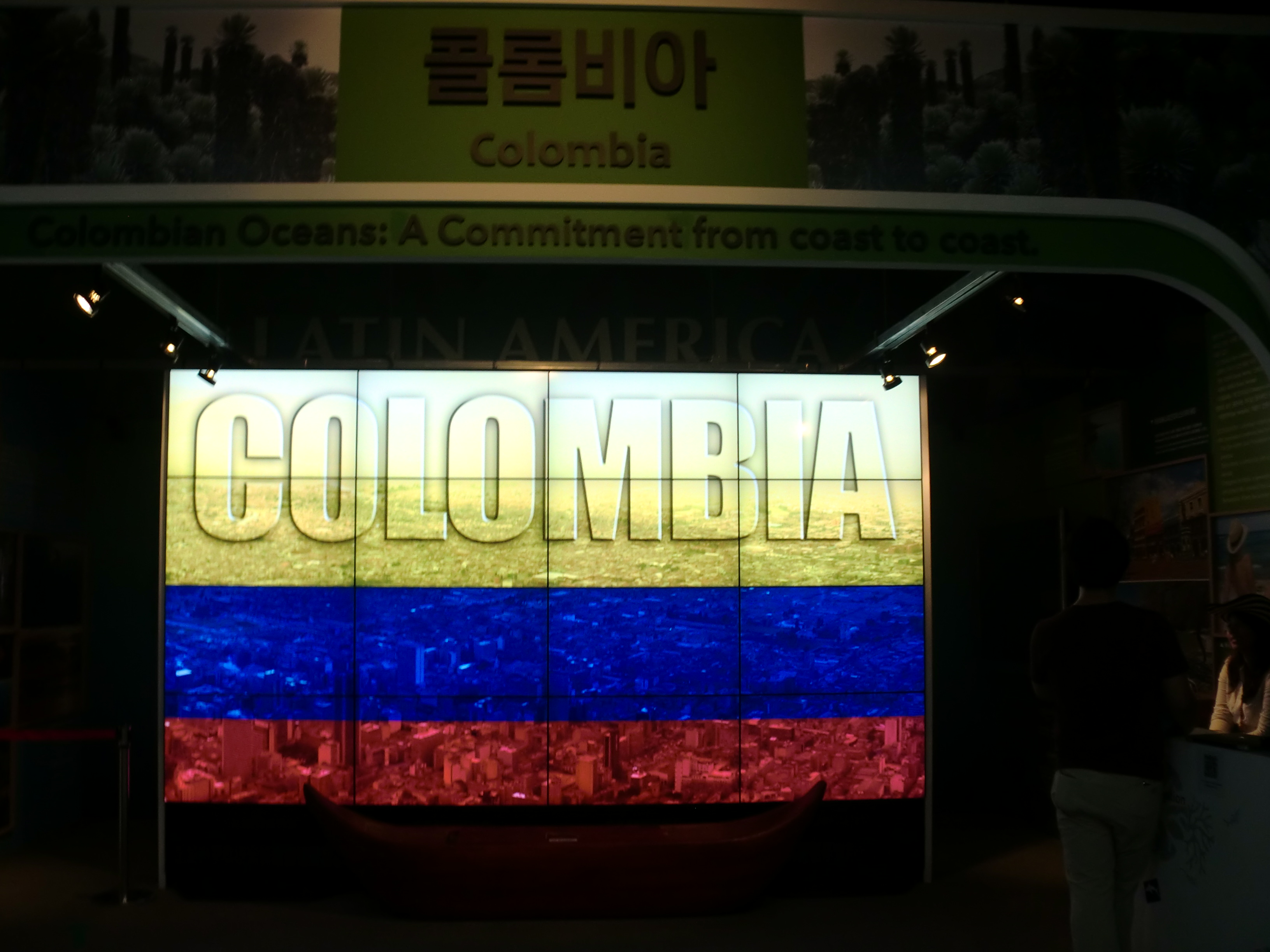 여수엑스포 국제관 대서양공동관 코롬비아